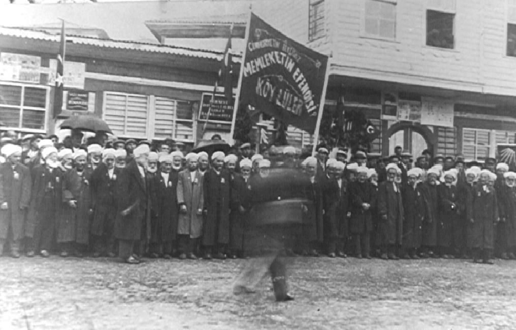 1930'larda Rize'de din adamlarının katılımıyla gerçekleşmiş bir etkinlik. "Memleketin efendisi köylüler" sloganını taşıyan bir pankart görülüyor.